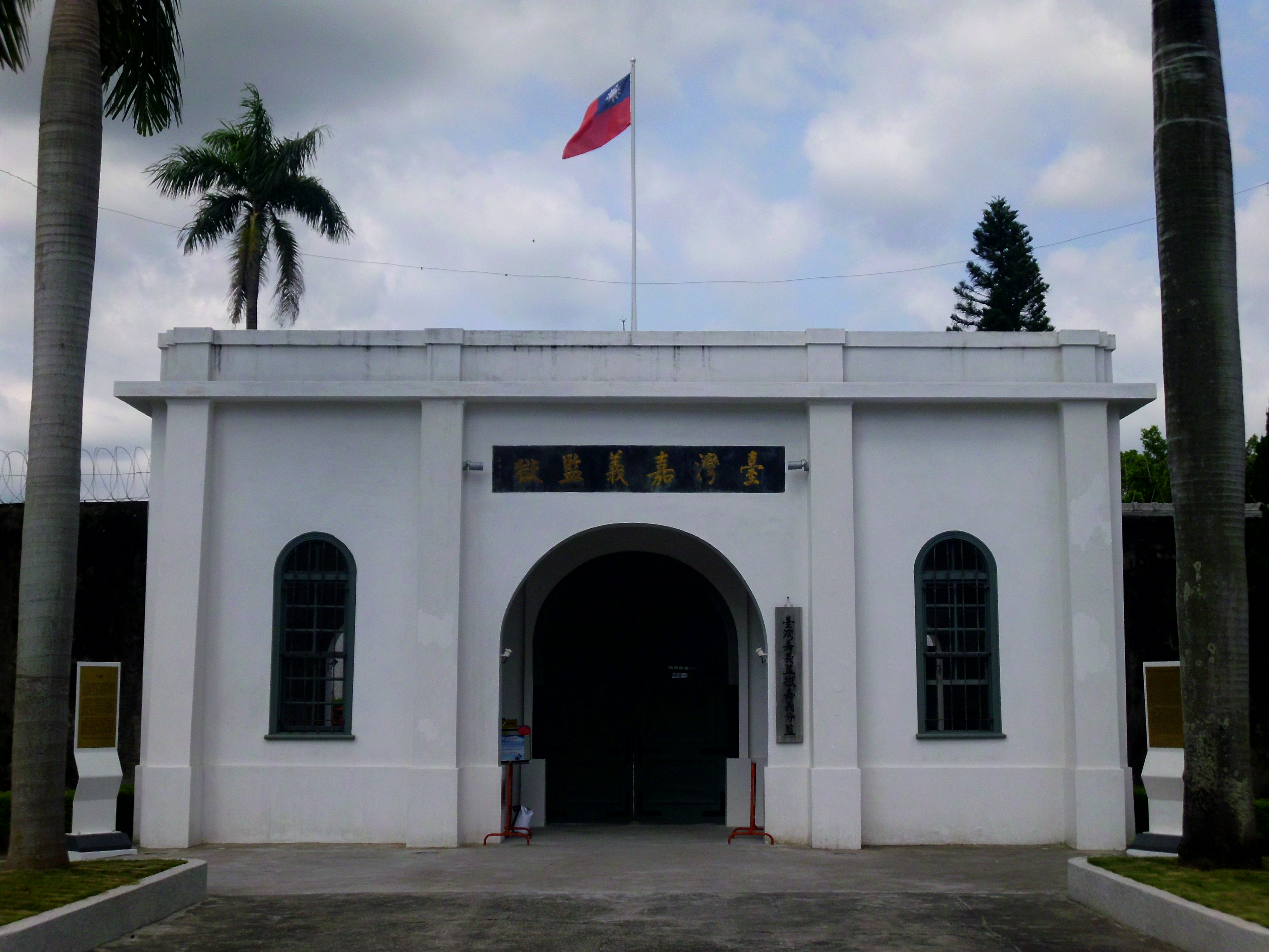 中文（台灣）: 嘉義舊監獄大門